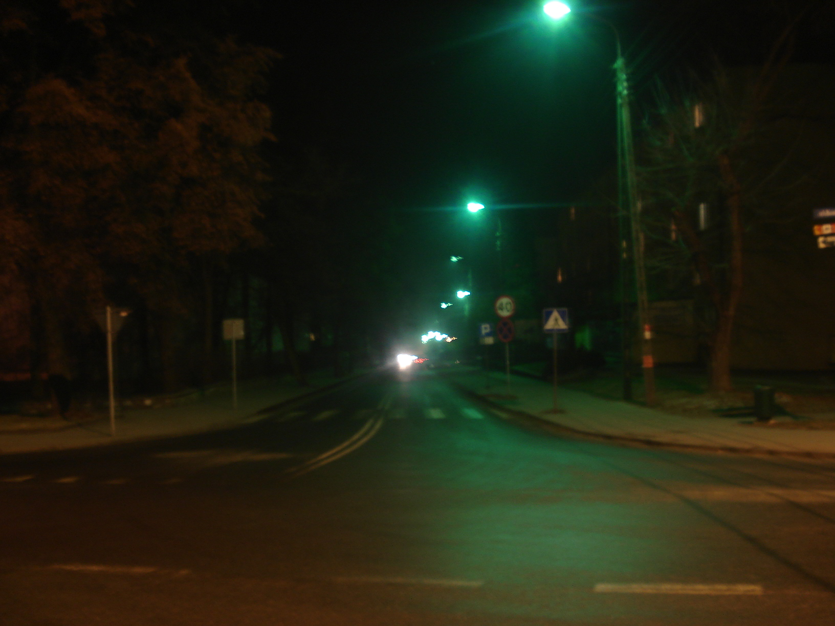 Ul. Zamkowa w Szydłowcu w nocy